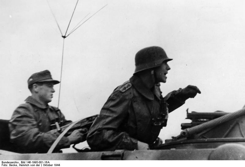 Brückenkopf Memel "Feuer frei!" Der Kommandeur eines Schützenpanzer-Bataillions der Division "Großdeutschland" gibt den Feuerbefehl gegen sowjetische Stellungen im Brückenkopf Memel Kriegsberichterstatter v.d. Becke 30-10-44 [Herausgabedatum] Transocean-Europapress